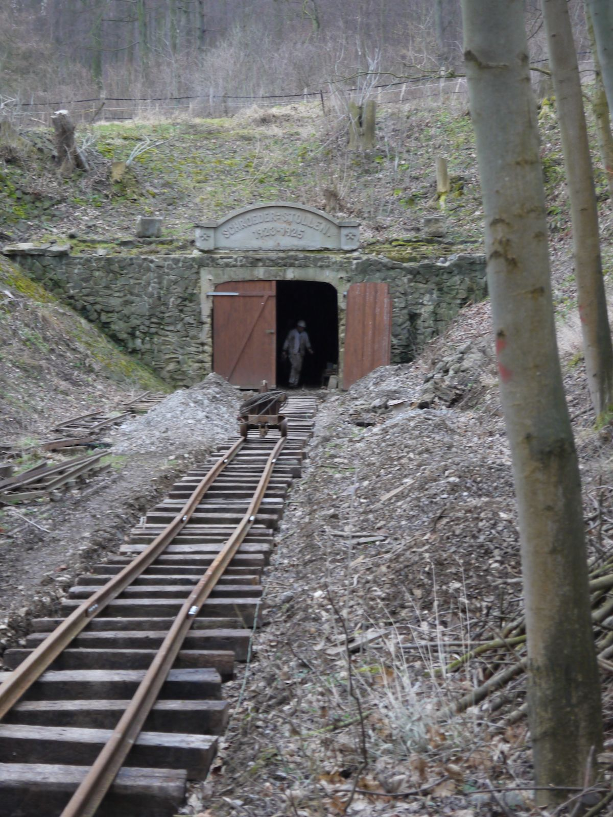 Schroederstollen - Blick auf das Mundloch